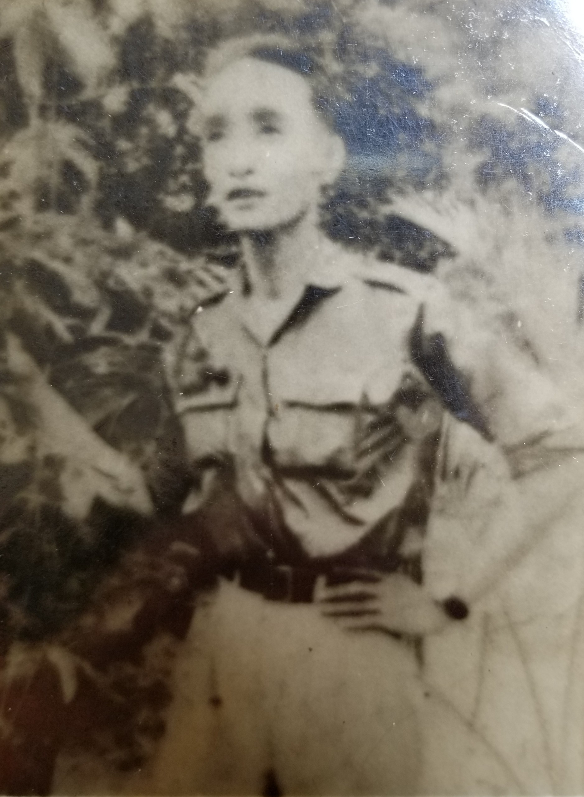 hình chụp thiếu tướng Dương Văn Dương